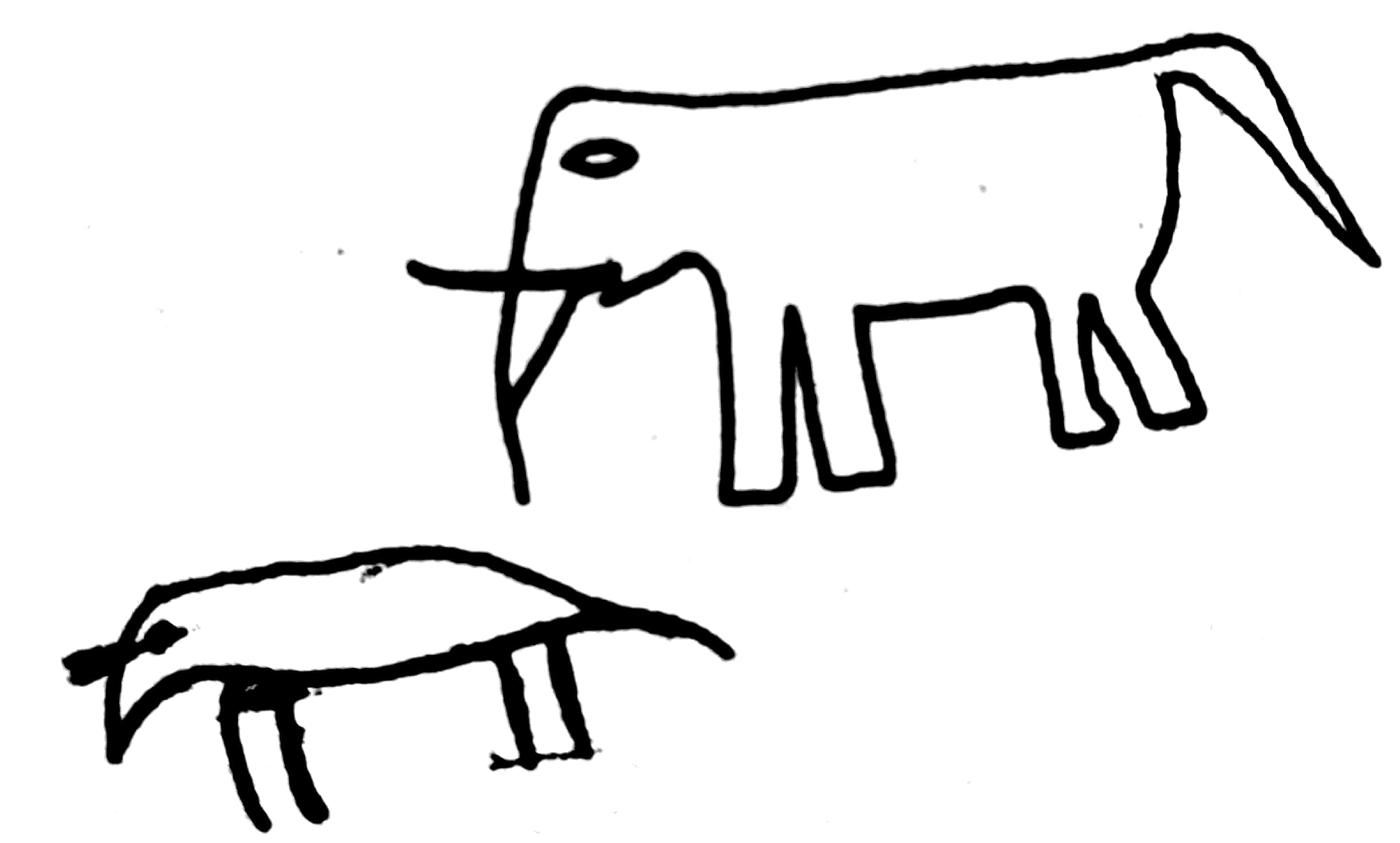 සිංහල: දොරවක ගුහා සිතුවමක්. සිතුවමේ නම - ඇතා සහා පැටවා